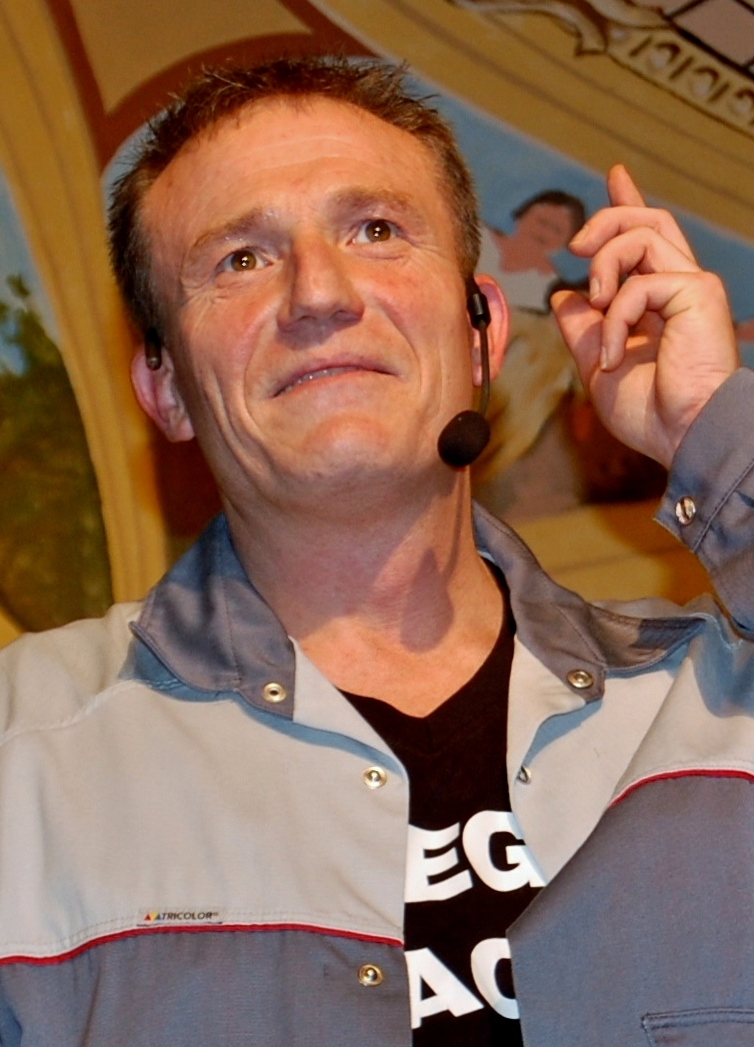 Kabarettist Michl Müller im Januar 2013 in seinem Heimatort Garitz